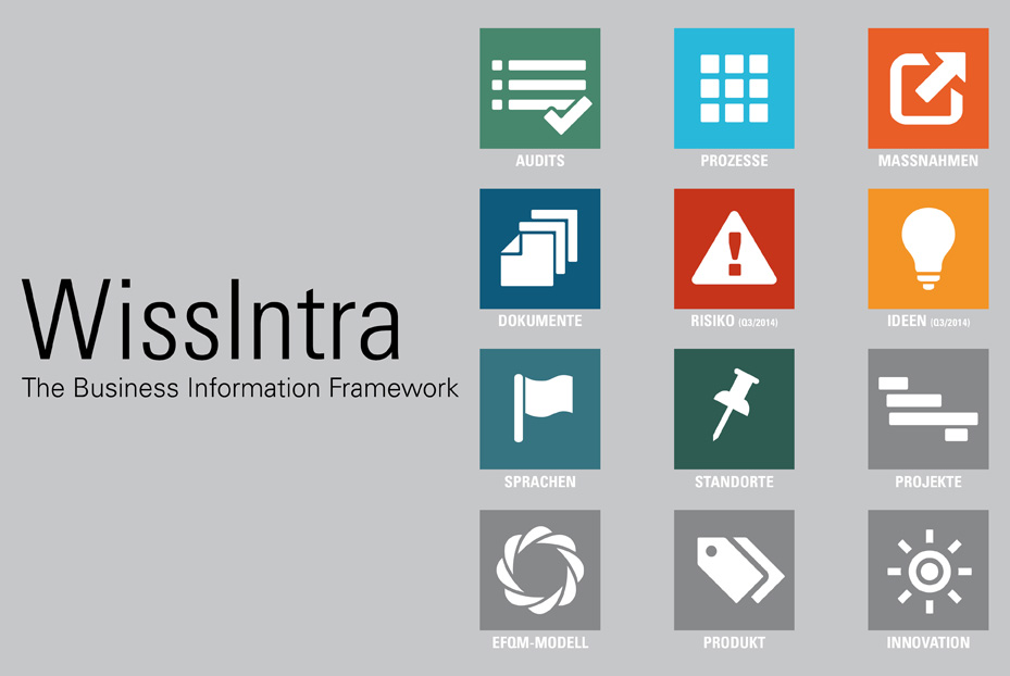 Übersicht über die Module der Softwarelösung WissIntra NG